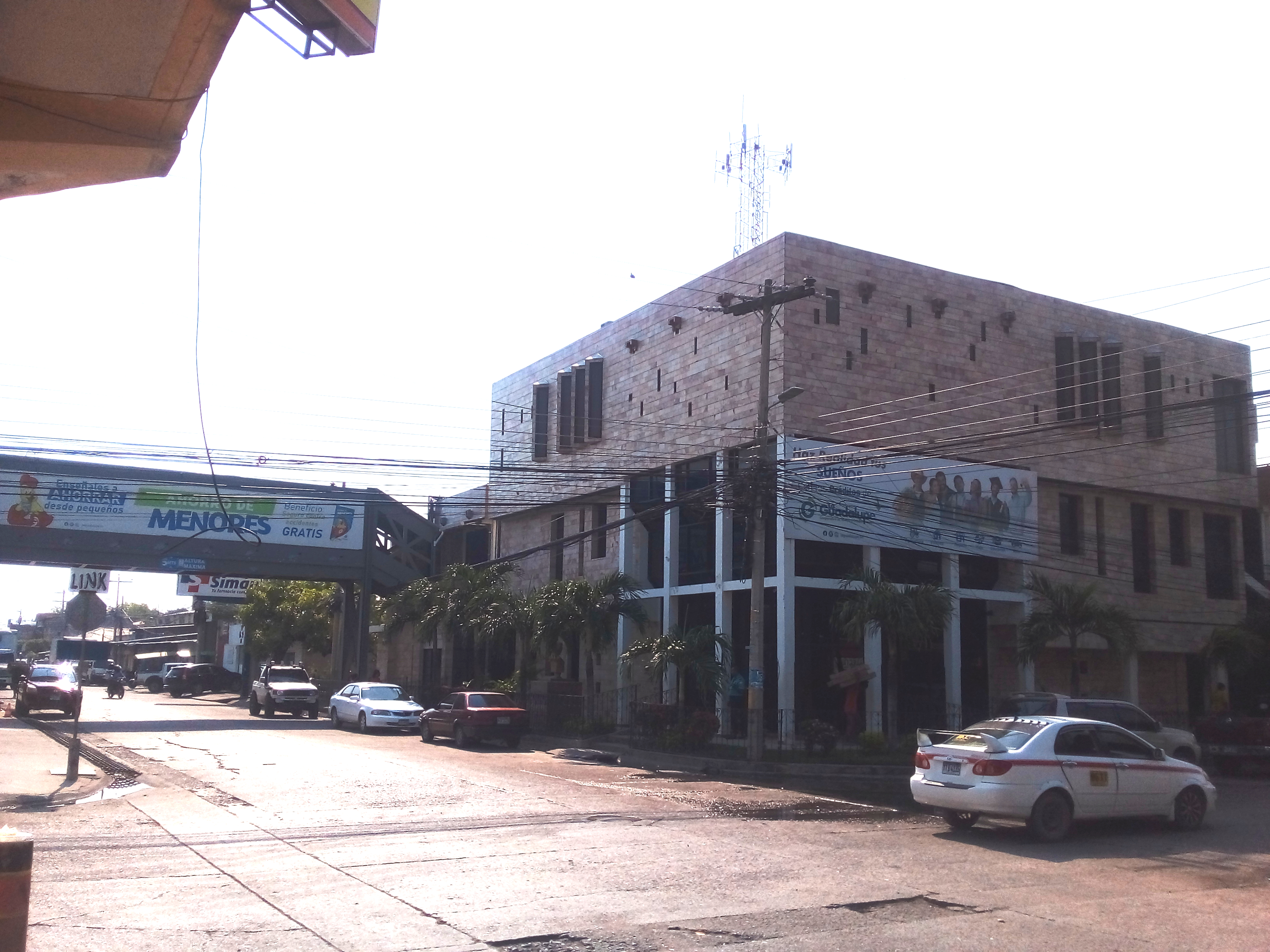 Edificio financiero Choluteca